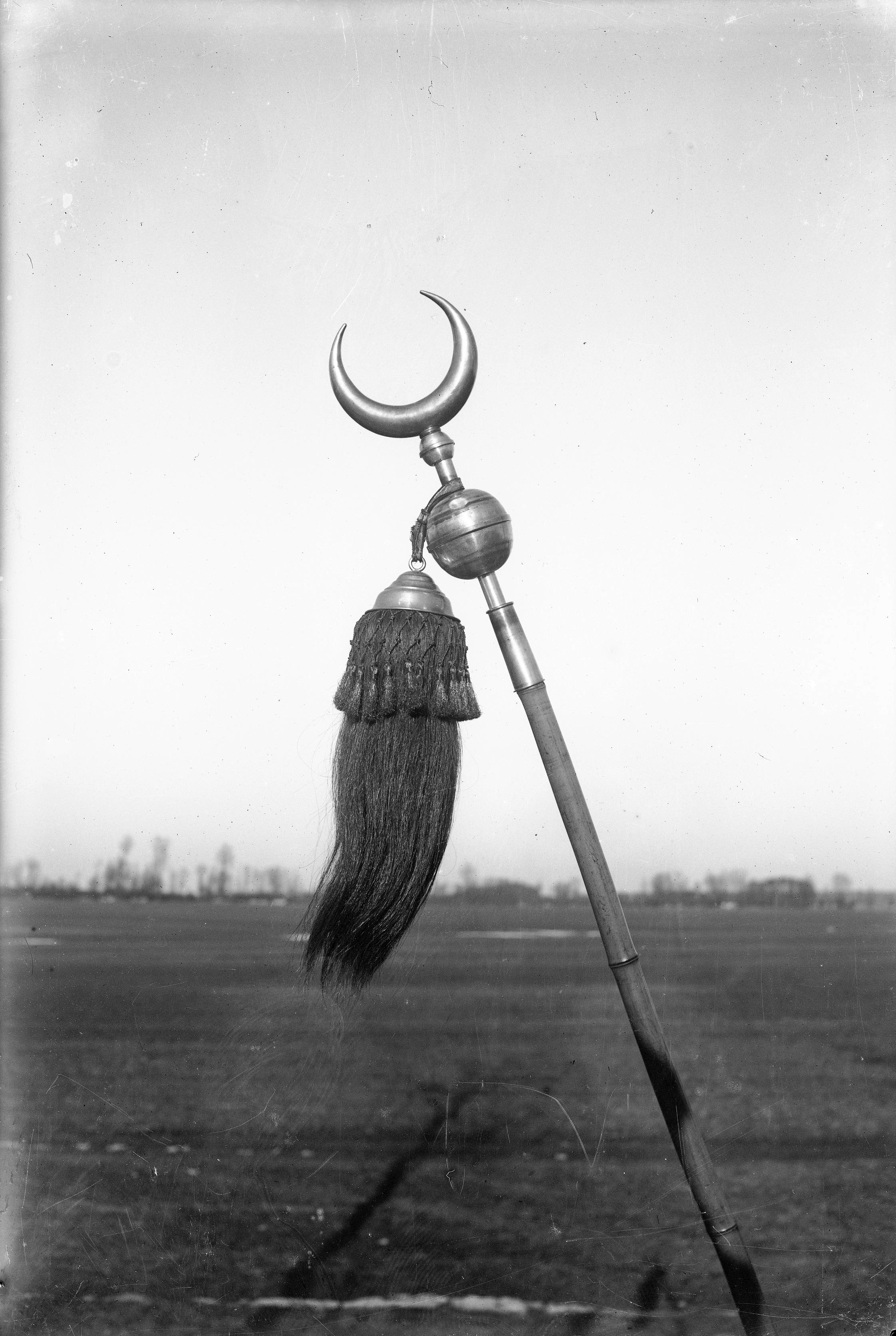 Buńczuk.